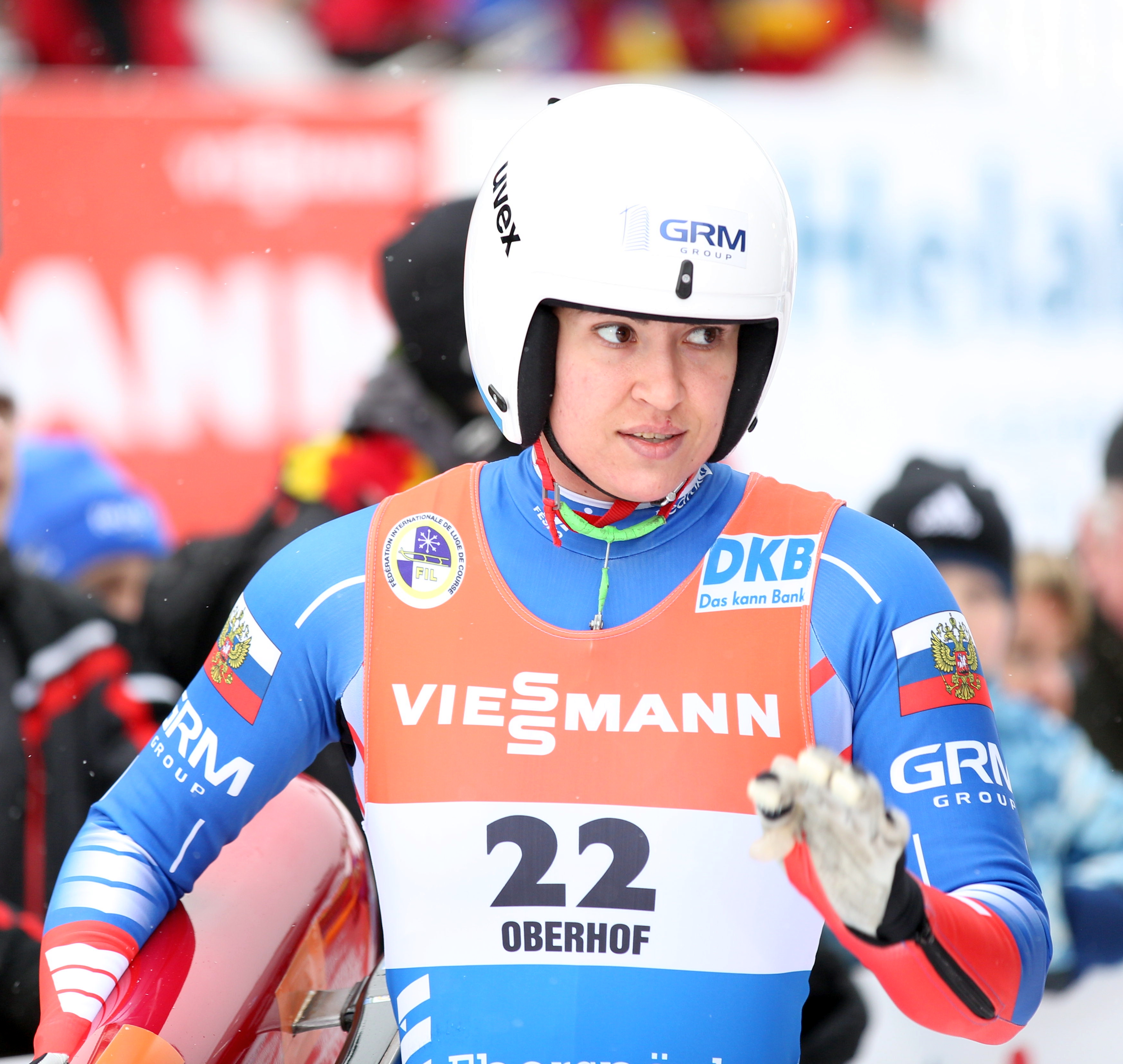 Tatyana Ivanova beim Rennrodel-Weltcup der Damen 2017 in Oberhof